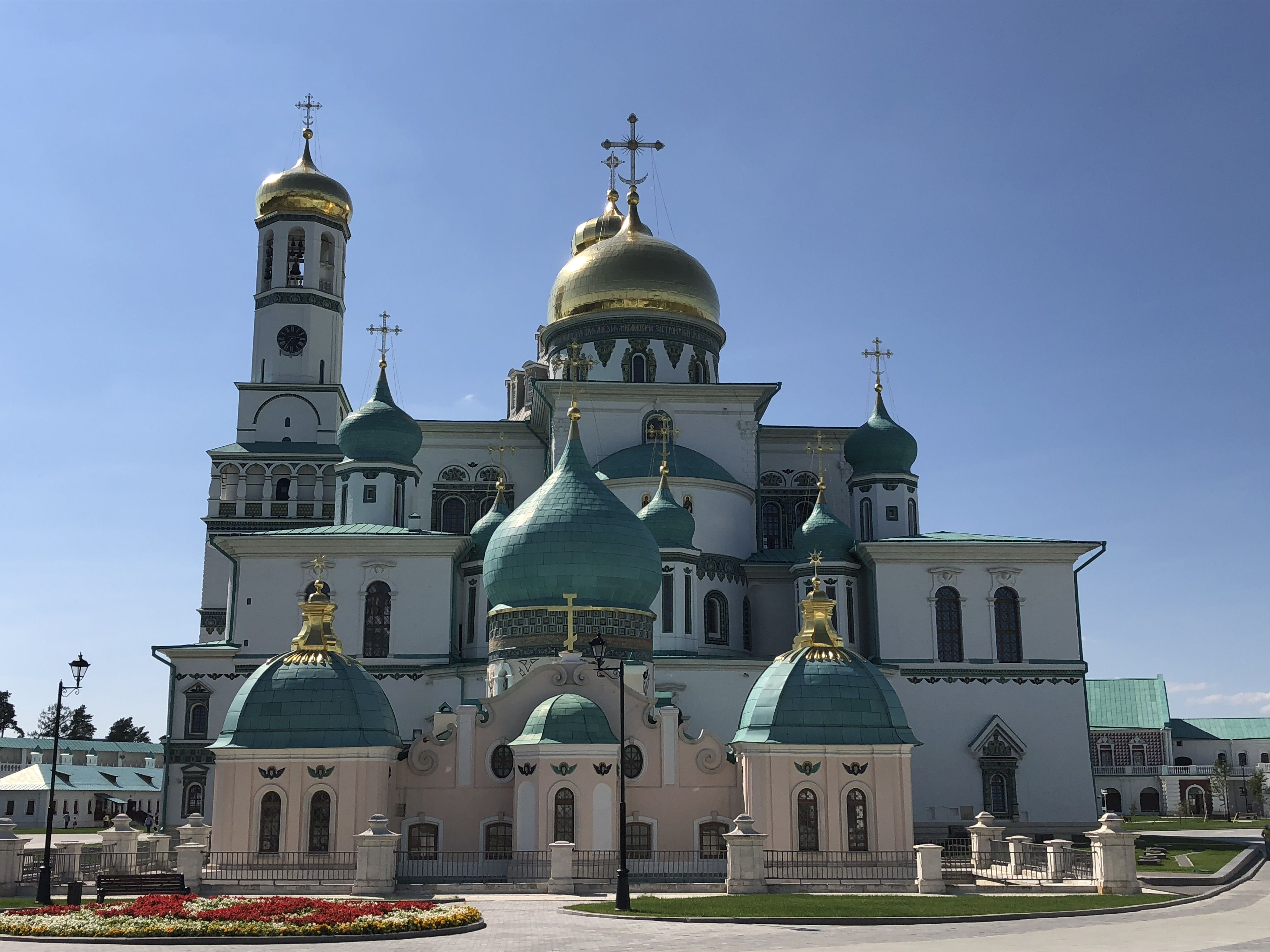 Воскресенский собор Новоиерусалимского монастыря